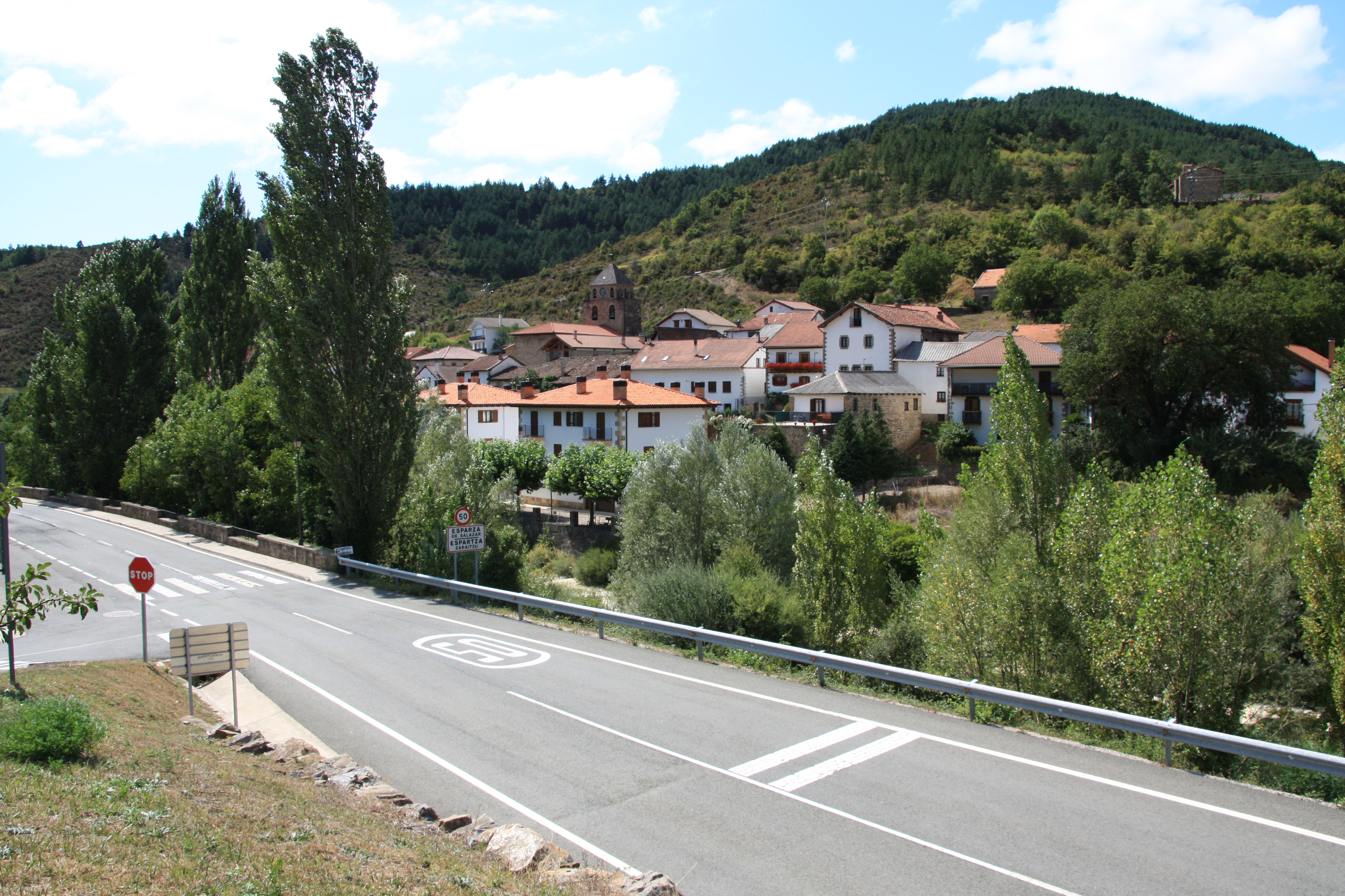 Herriaren ikuspegia.